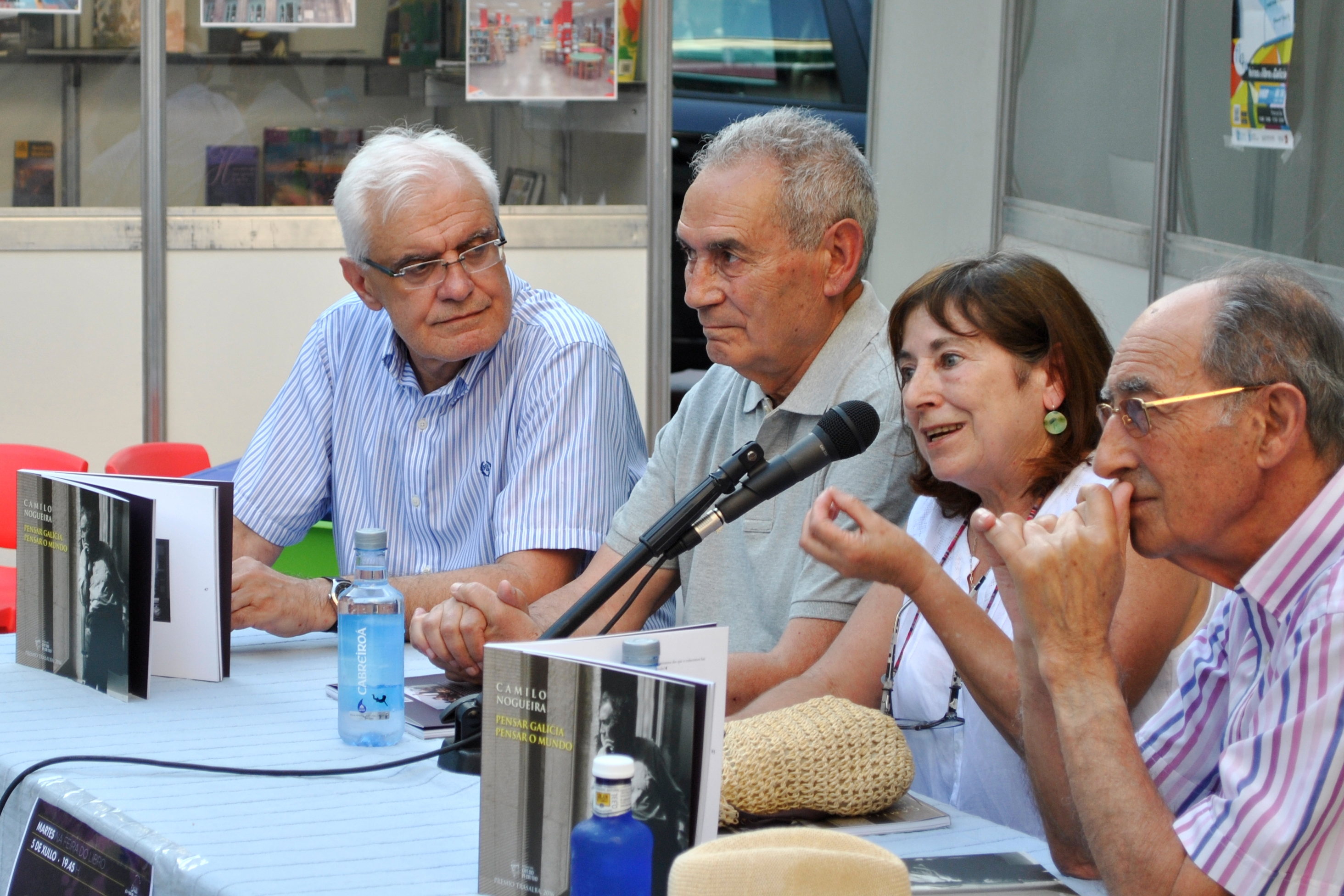 Presentación do libro Pensar Galicia, Pensar o mundo de Camilo Nogueira Román na Feira do Libro de Vigo 2016. Fotografía tirada ao aire libre na vía pública, na Porta do Sol de Vigo.